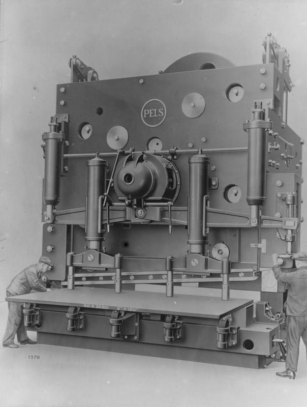 Ein Meisterwerk deutscher Technik! Eine Riesen-Mammut-Plattenschere für Blechbearbeitung, ein hervorragendes Zeugnis deutschen Werkzeugmaschinenbaues. Die Maschine ist 6 m hoch und 5 1/2 m breit. Das Gewicht beträgt 20000 kg. Für den Transport werden fünf Eisenbahnwagen benötigt. Information added by Wikimedia users.